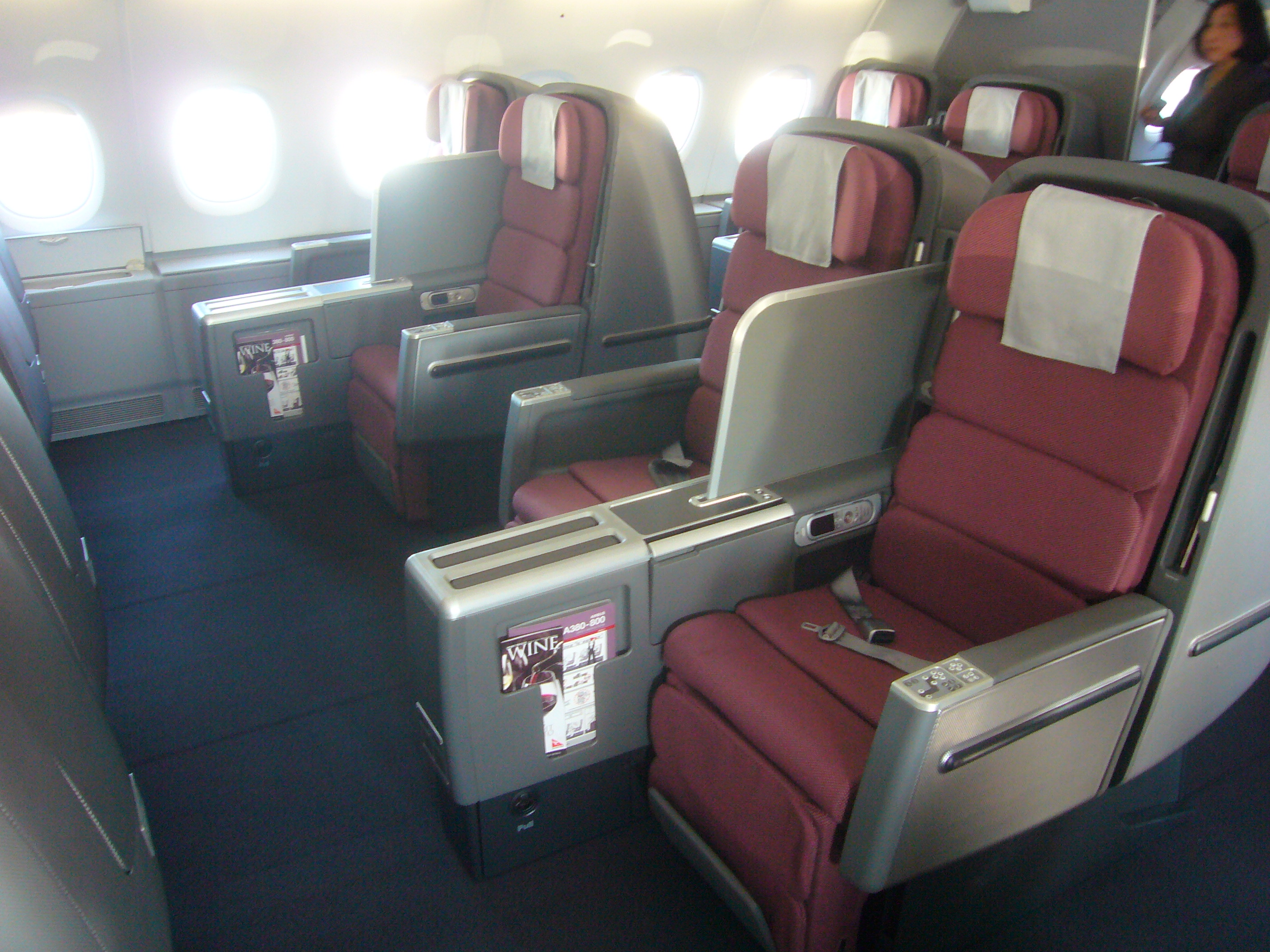 QF Business